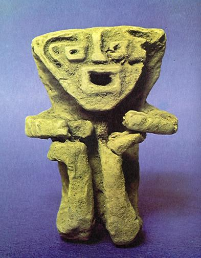 Cultura Chipcha Colombia